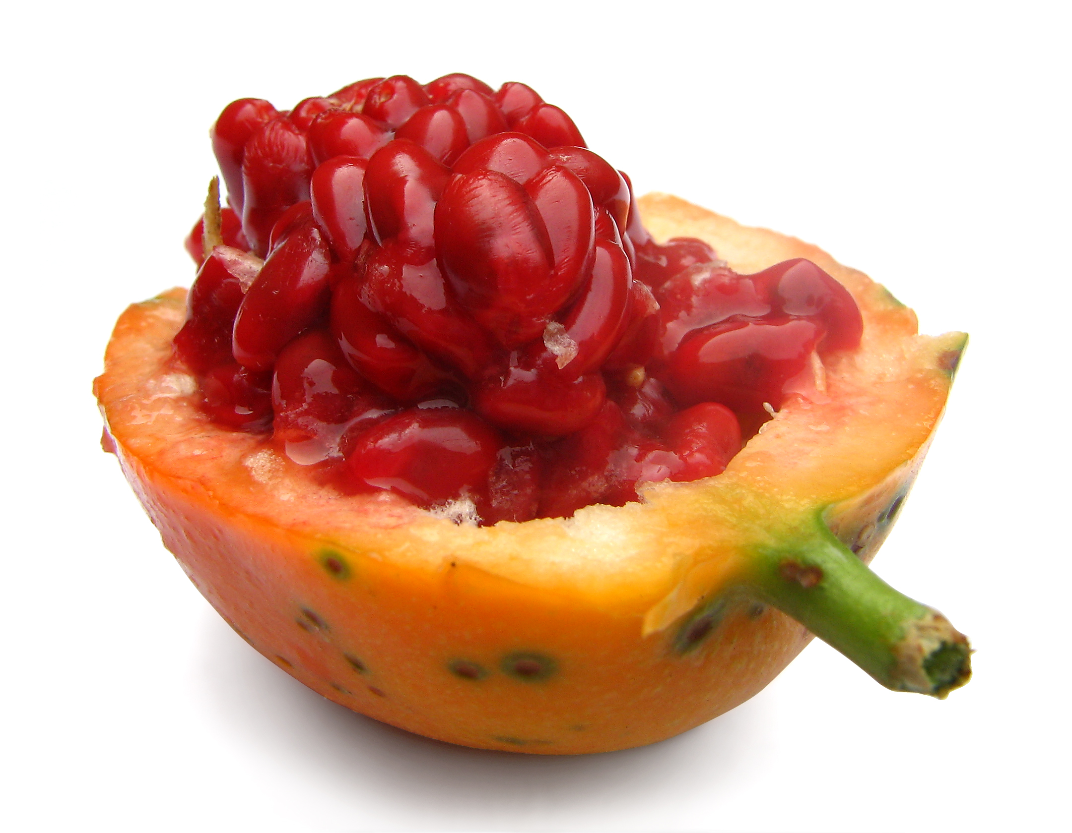 halk arasında kudret narı olarak bilinen dalga...